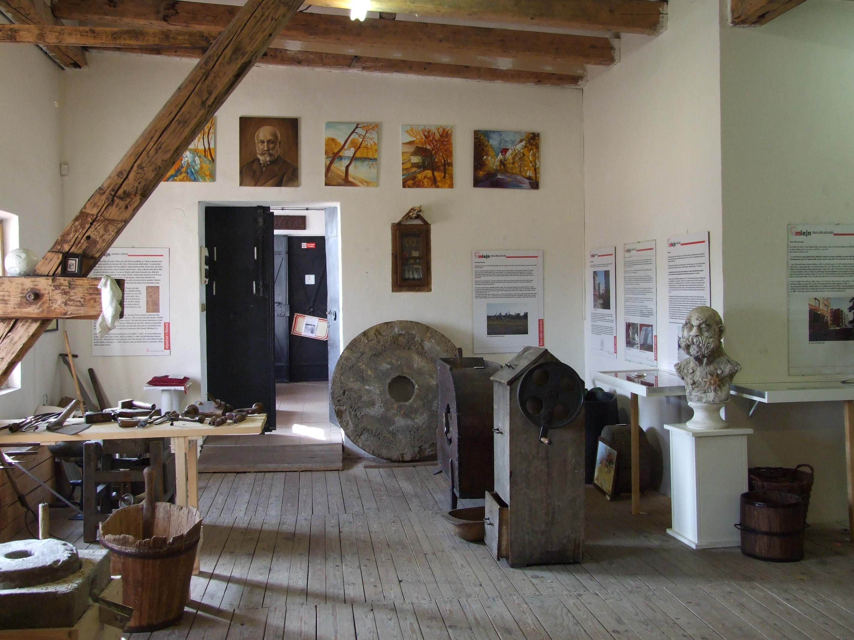 Interiér Muzea Mlejn